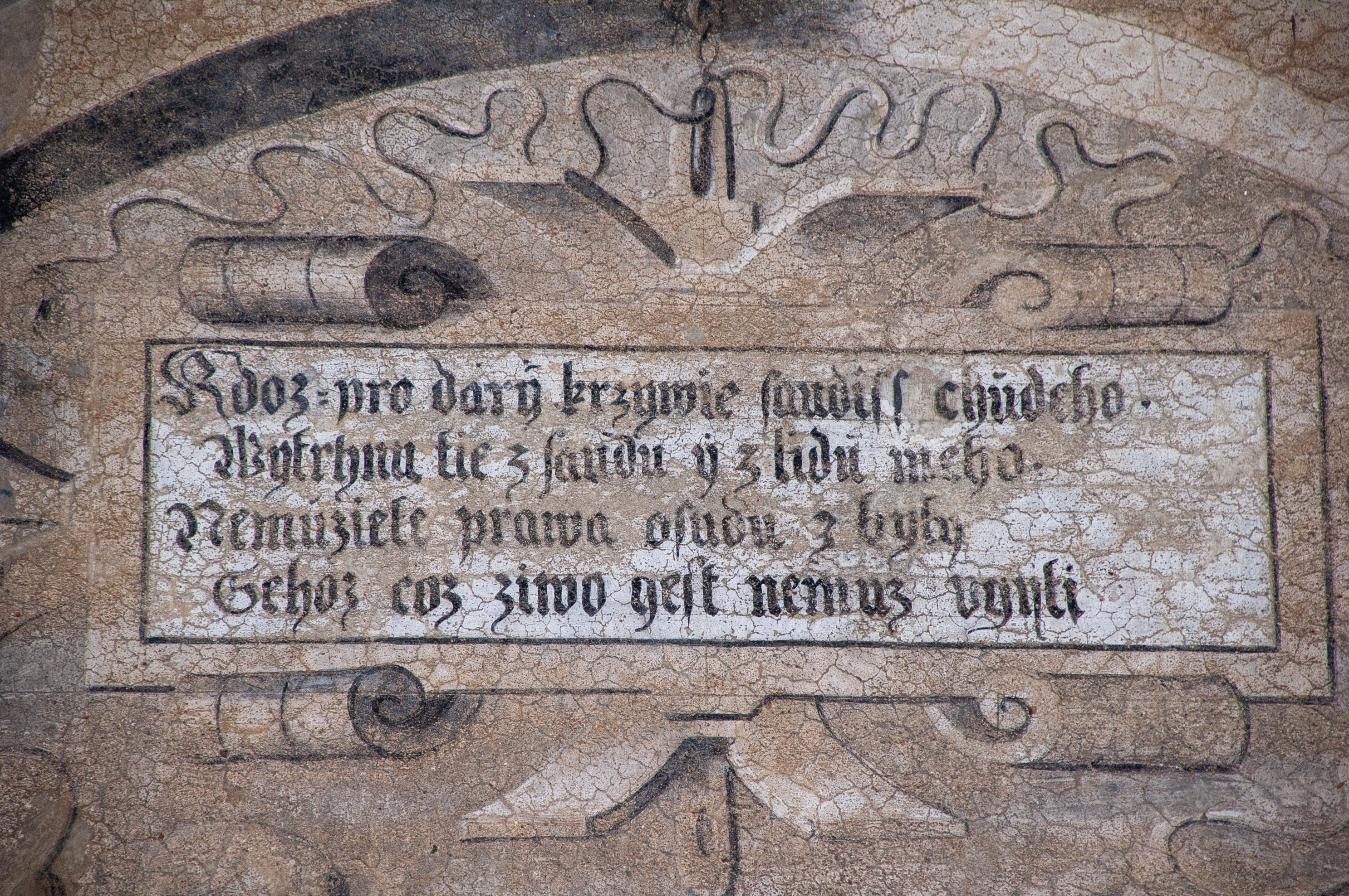 Budova staré radnice v Prachaticích – detaily